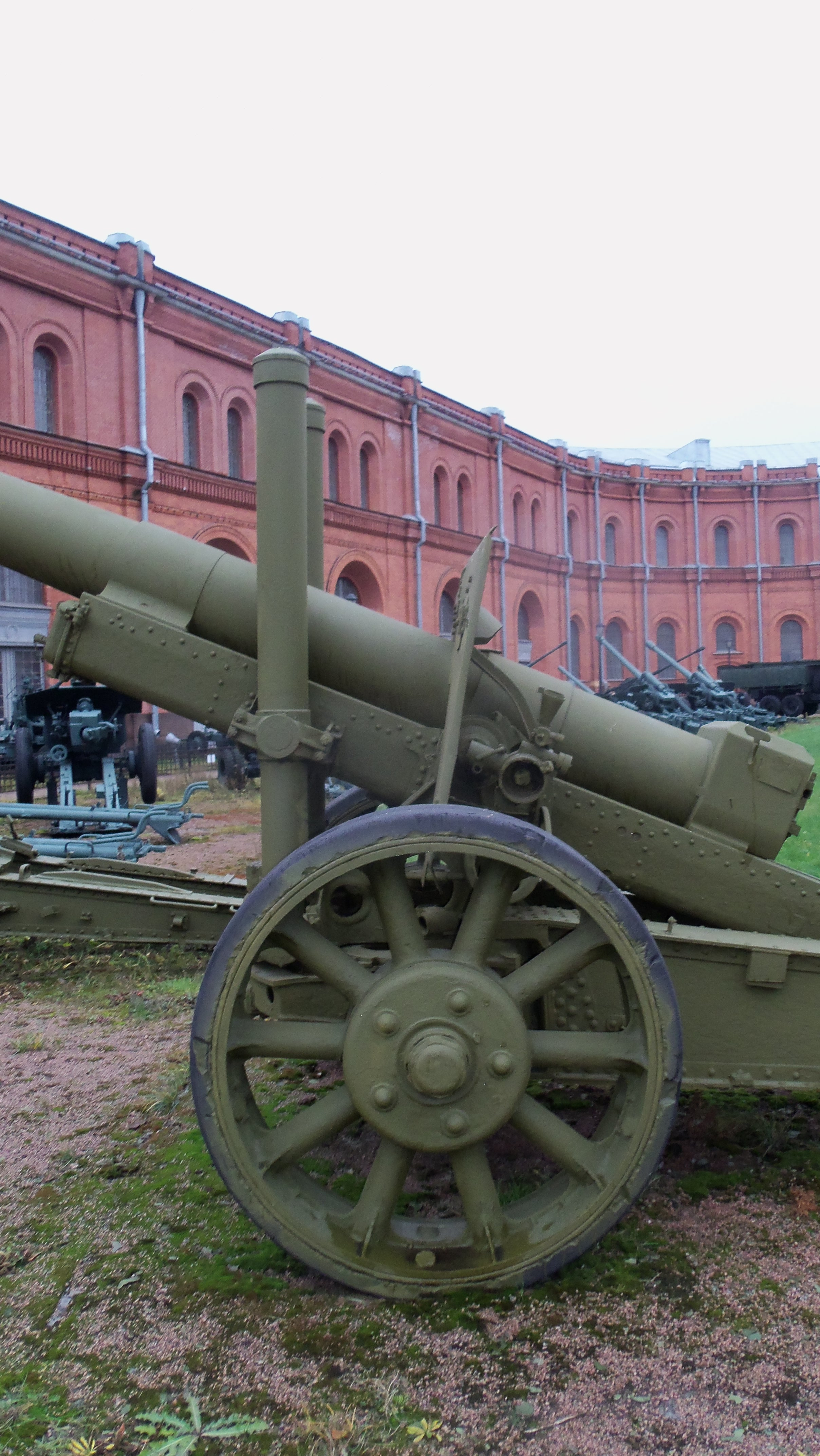 152-мм пушка образца 1910/34 годов в Военно-историческом музее артиллерии, инженерных войск и войск связи в Санкт-Петербурге